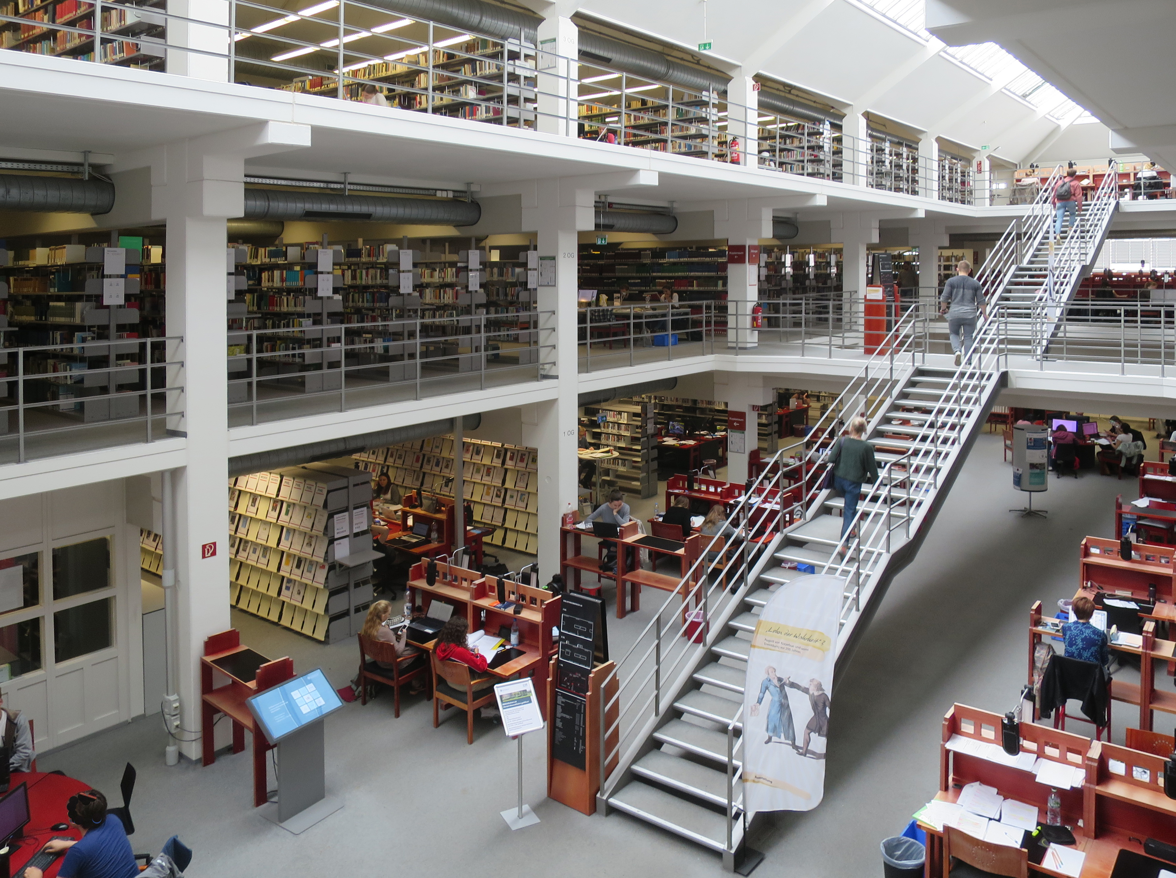 Bibliotheksbereich A 3 innen